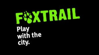 Logo Foxtrail, Schweiz